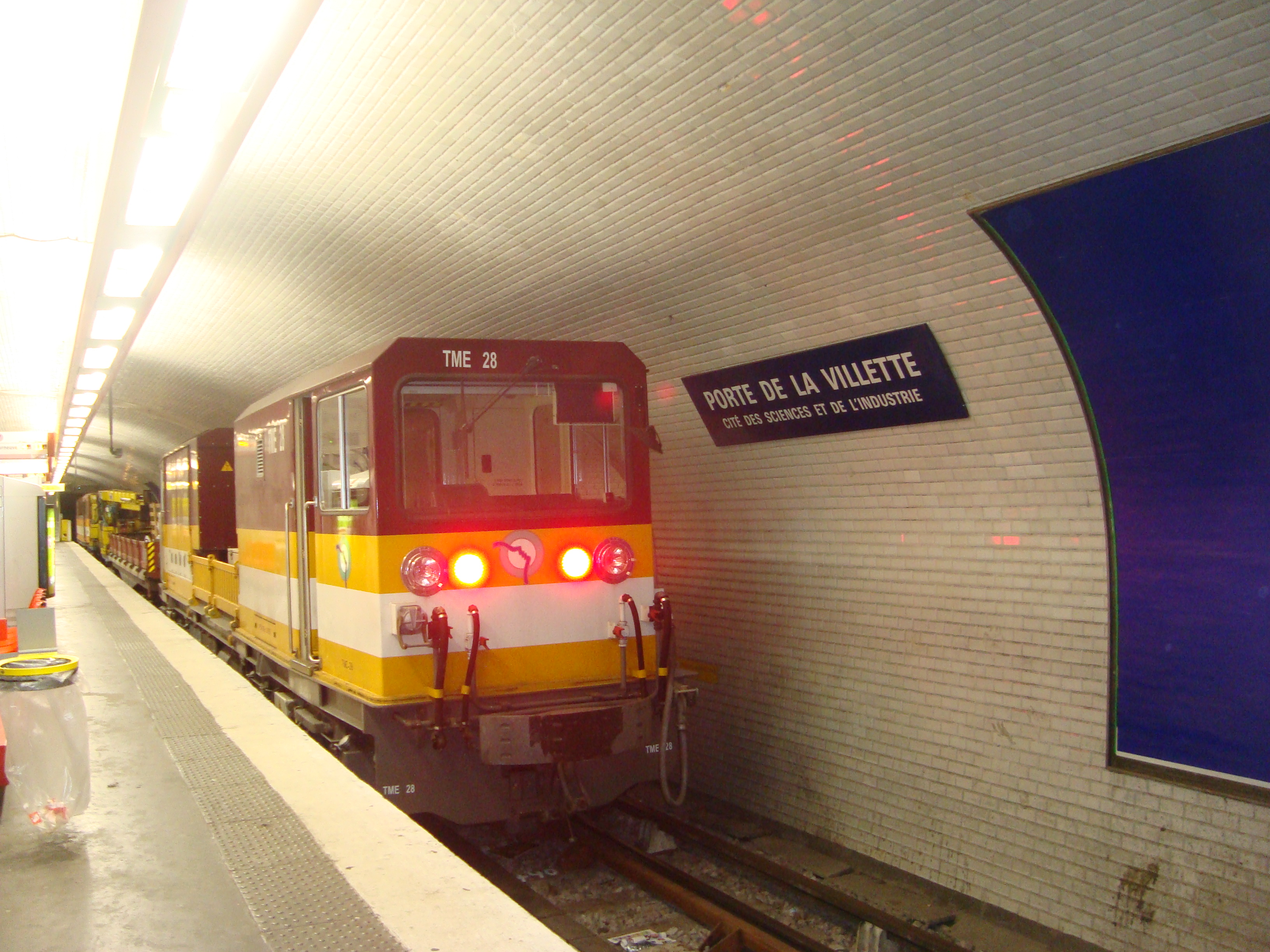 La rame d'entretien TME 28 passe en station Porte de La Villette.